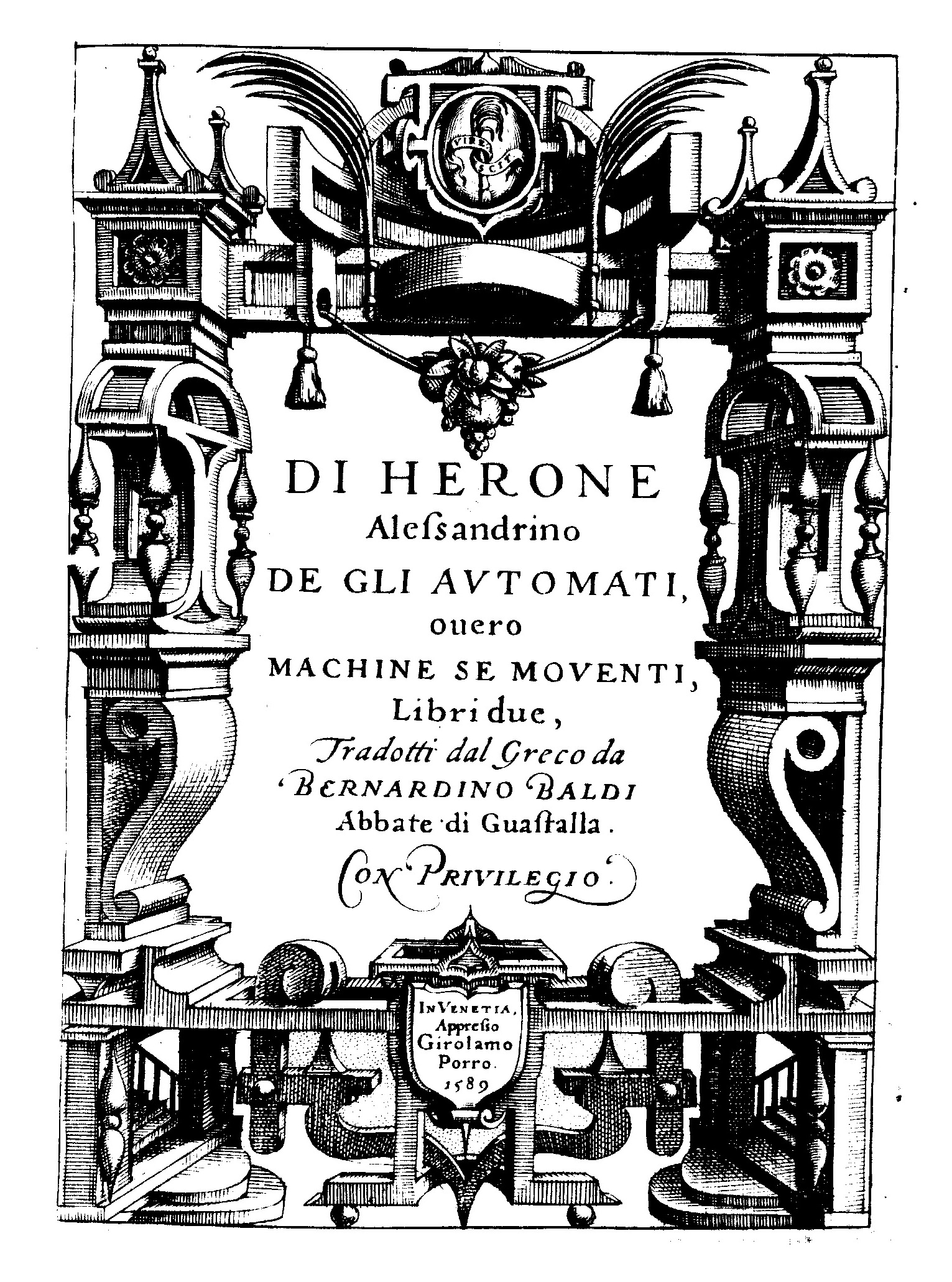 Di Herone Alessandrino De gli automati, ouero Machine se mouenti, libri due, tradotti dal greco da Bernardino Baldi abbate di Guastalla. - In Venetia : appresso Girolamo Porro, 1589. - 47, [1] c. : frontespizio, ill. calcografiche ; 4º .